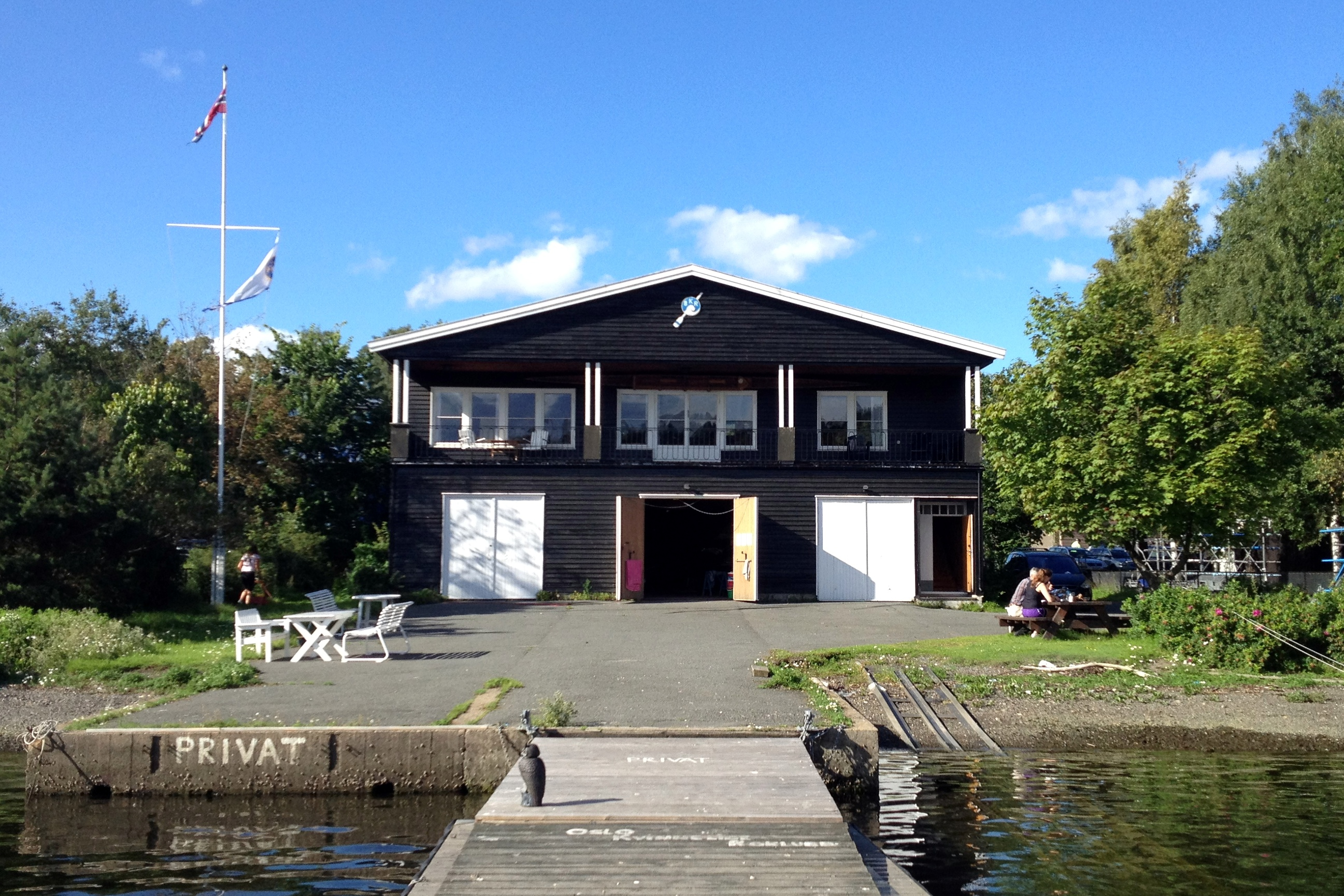 Klubb- og båthuset til Bestumkilen Roklubb